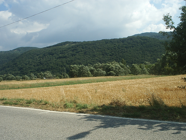 Paesaggio abruzzese lungo la statale 578 al km 72